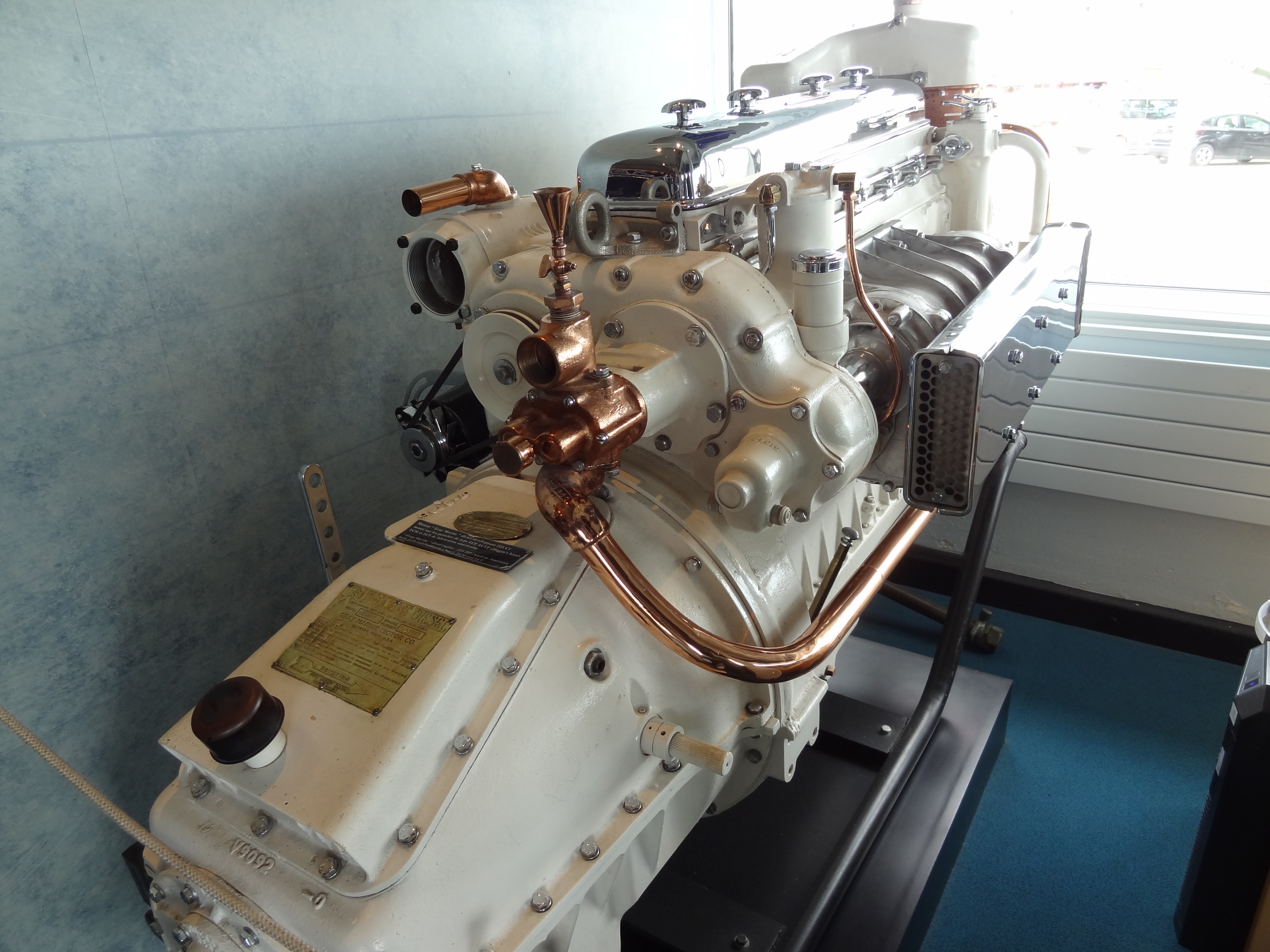 Gray Marine Diesel Engine